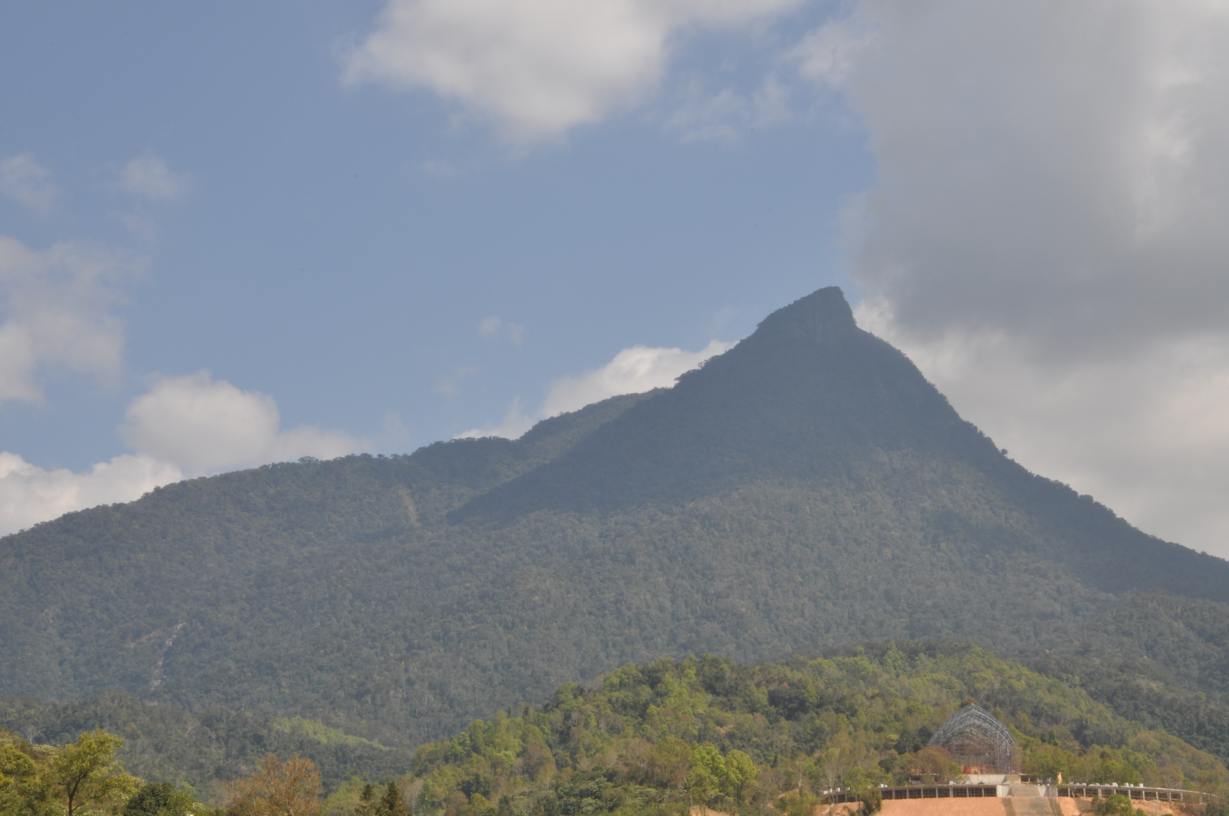 五指山